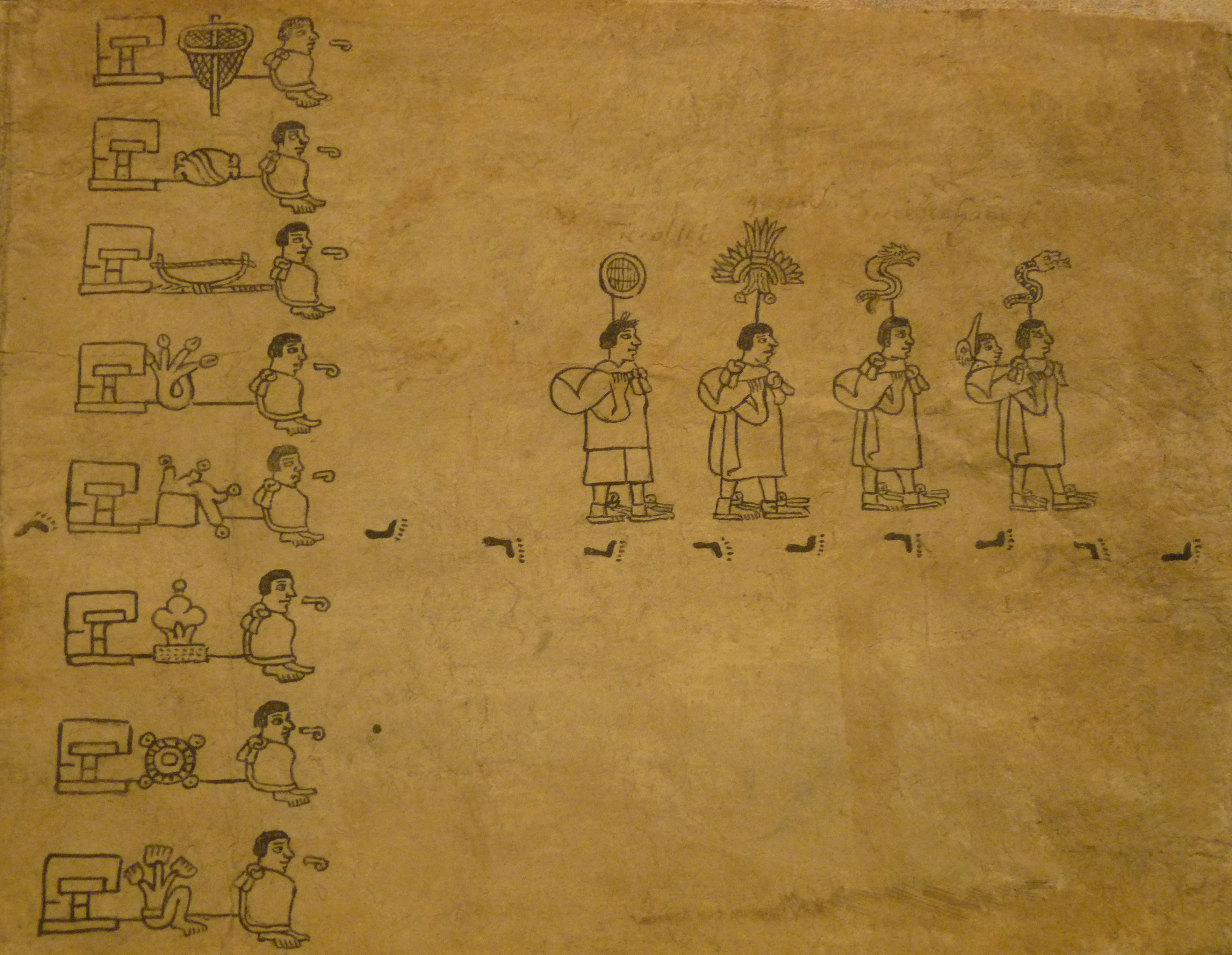 Codex Boturini (also known as Tira de la peregrinación), folio 2